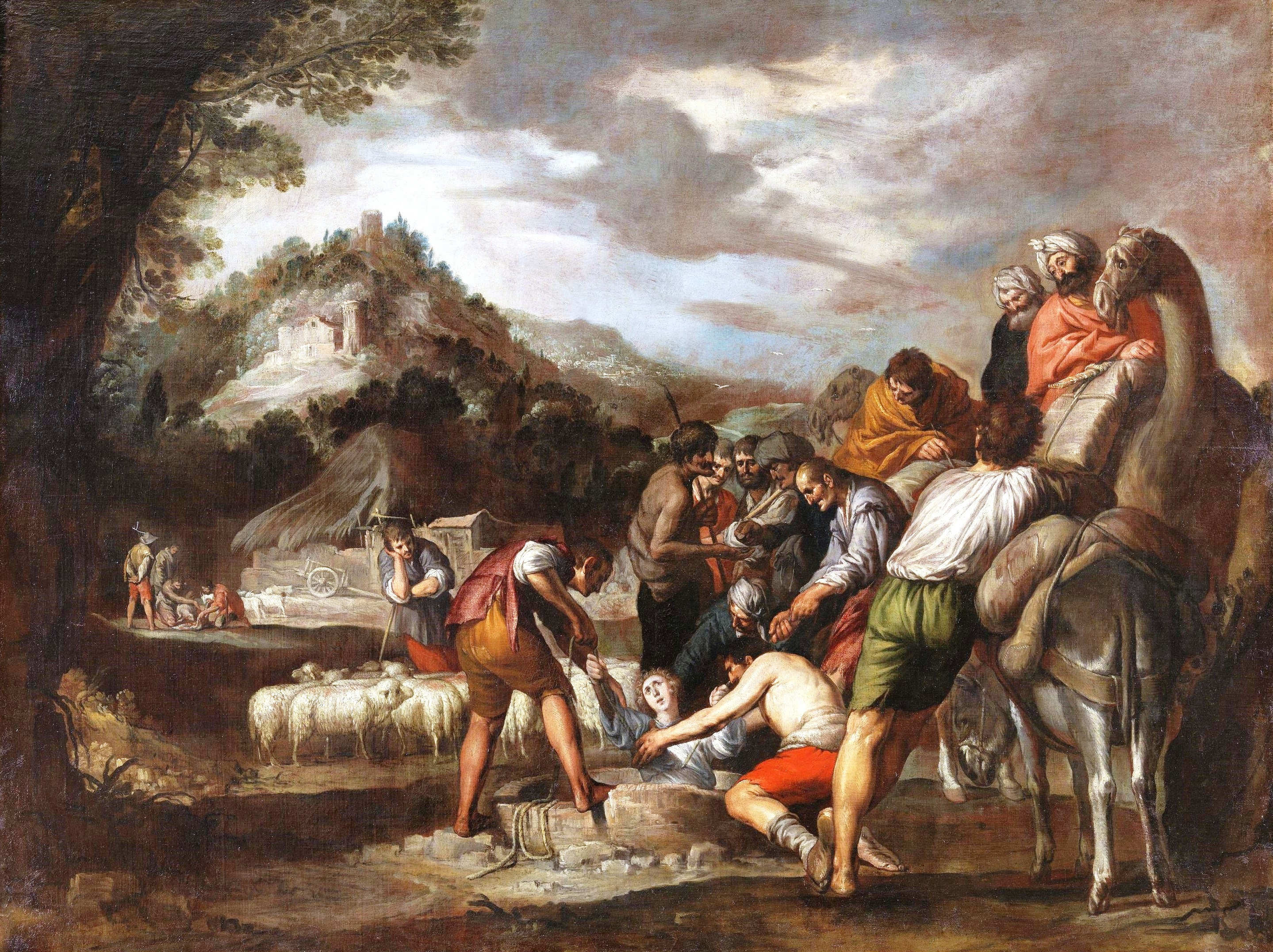 La obra representa el momento en que José, hijo del patriarca hebreo Jacob, fue vendido por sus propios hermanos a unos tratantes de esclavos debido a la envidia que sentían hacia él.